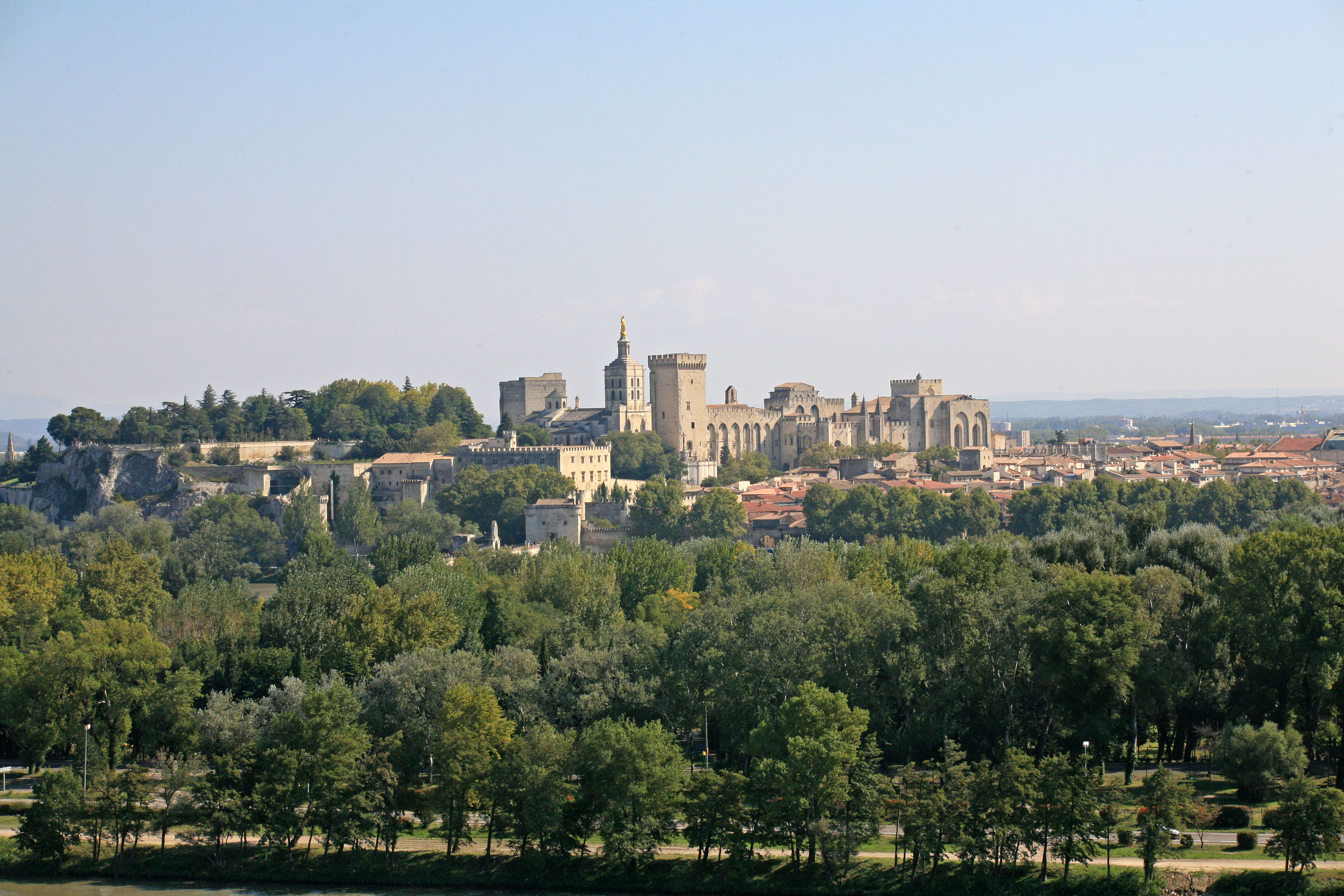 Avignon, Rocher des Doms et Palais des Papes